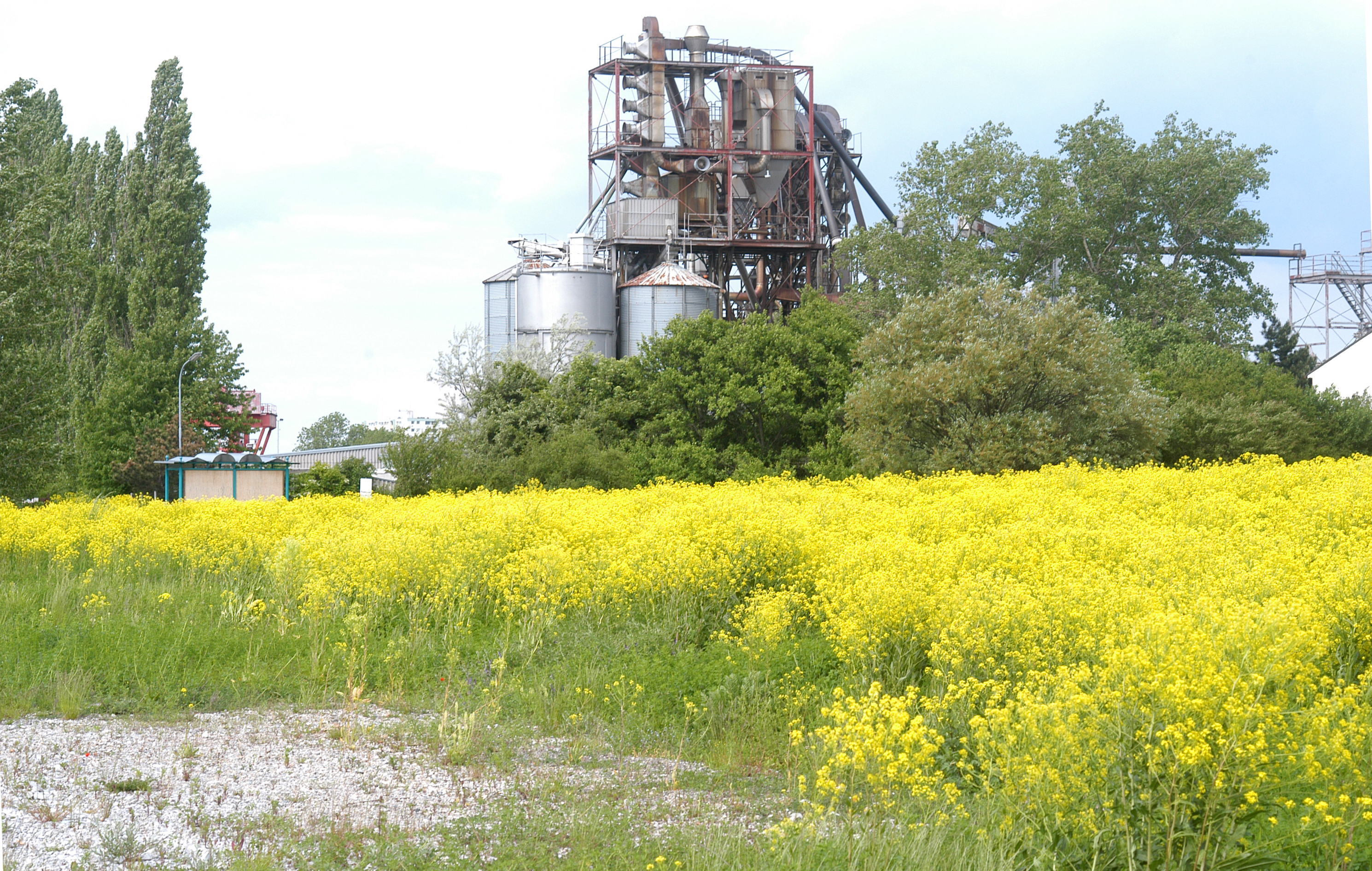 Massenbestand von Bunias orientalis auf Industriebrache in St. Pölten